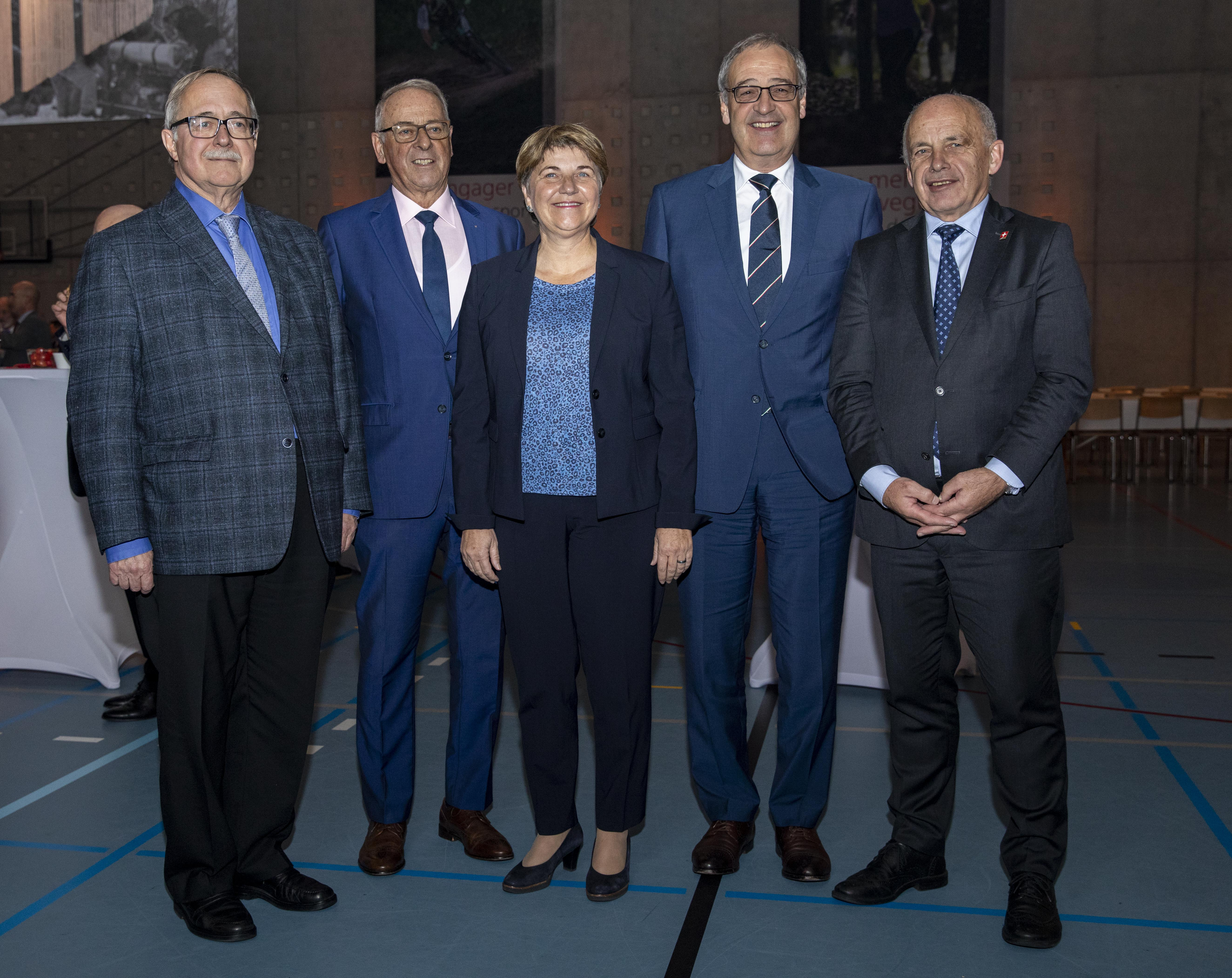 Im Rahmen des Jubiläumsjahres 2019 des Bundesamts für Sport BASPO nahmen alt Bundesrat Samuel Schmid, alt Bundesrat Adolf Ogi, Bundesrätin Viola Amherd, Bundesrat Guy Parmelin und Bundespräsident Ueli Maurer (v.l.) an einer Feier in Magglingen teil.